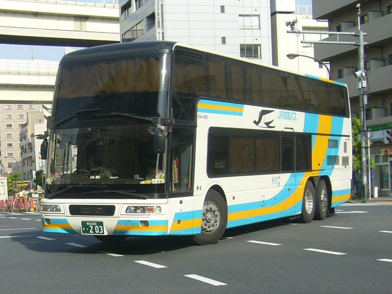 登録番号 徳島200か・203 ジェイアール四国バス徳島支社所属 ドリーム徳島号用 三菱ふそう・エアロキング MU612TX